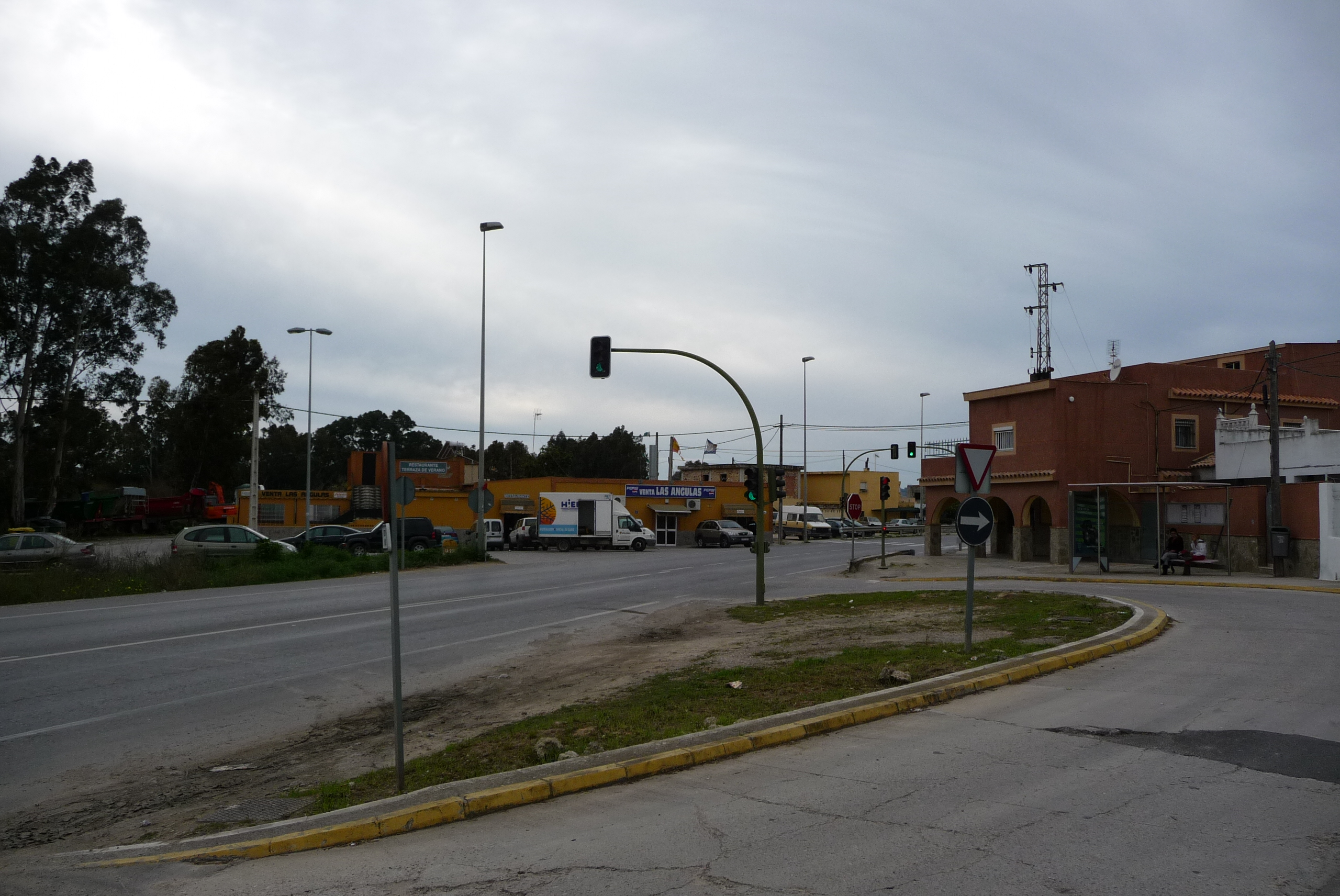 La Corta-p1010249.jpg